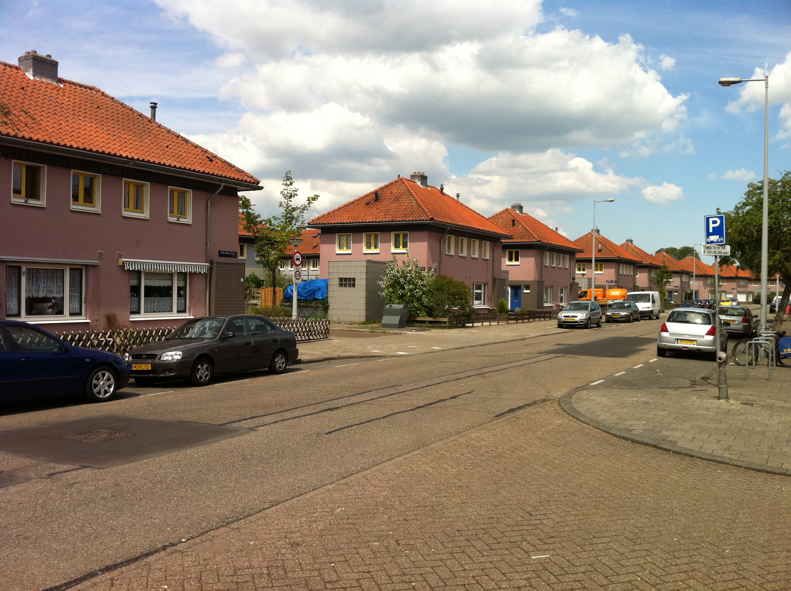 Ontworpen als Tuindorp Buiksloterham, grens Floradorp-Bloemenbuurt. eigendom van woningcorporatie Ymere